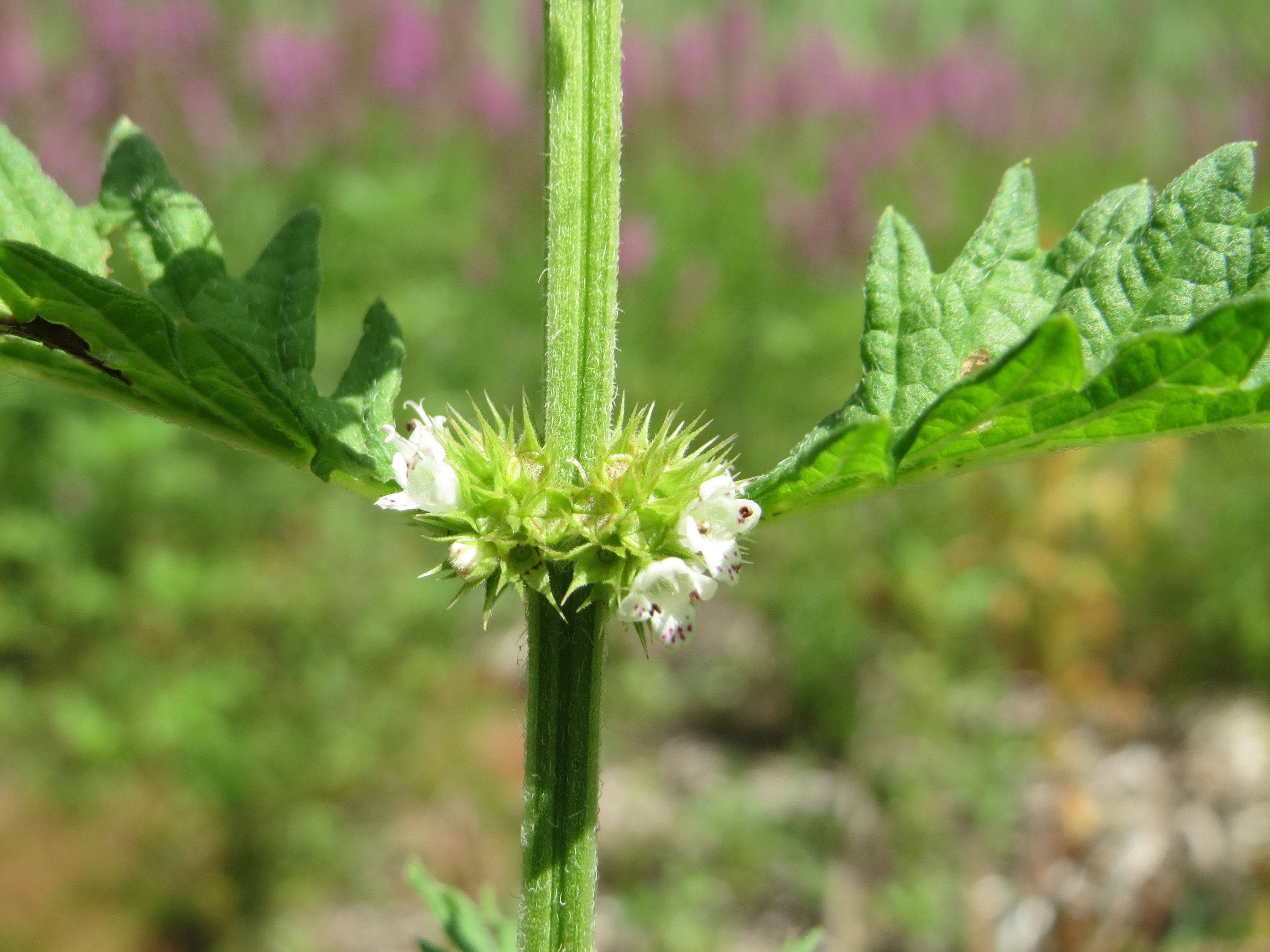 Ufer-Wolfstrapp (Lycopus europaeus) im Naturschutzgebiet „St. Arnualer Wiesen“